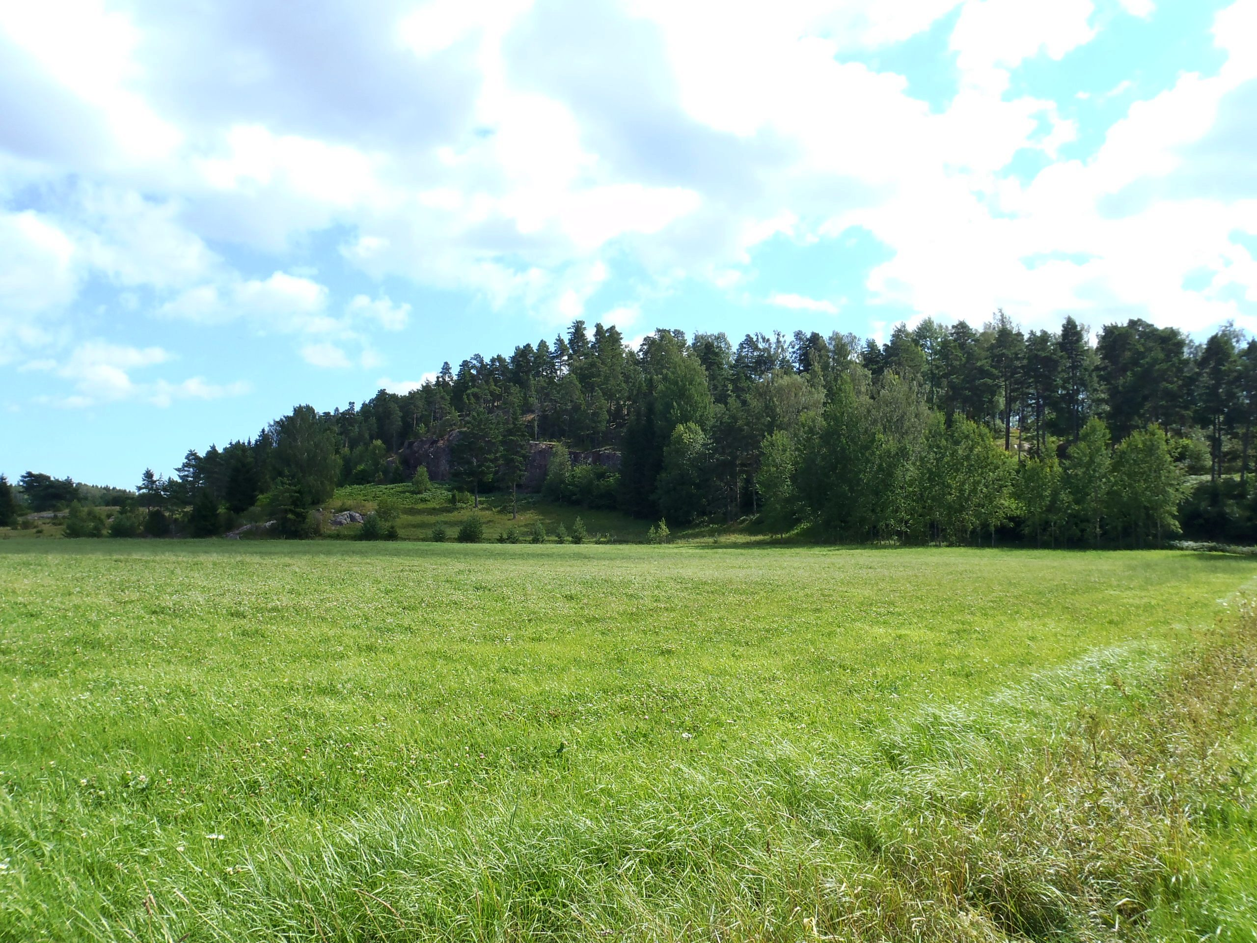 Av Ålands sex fornborgar är Borge fornborg i Borgboda, Saltviks kommun, den största med sina tre hektar och intressant med sina kvarlämningar av forntida bostäder (spår av byggnadsgrunder).